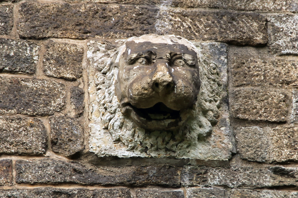 Löwenbrücke in Radeberg, Löwenkopf-Relief auf der Röderseite